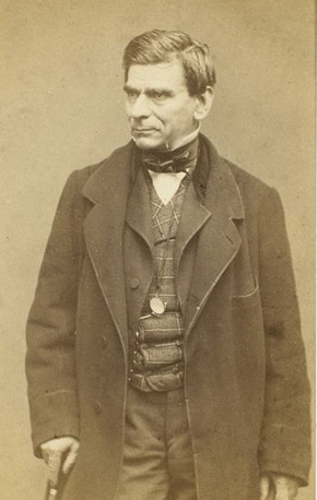 Portrait de Louis Monrose